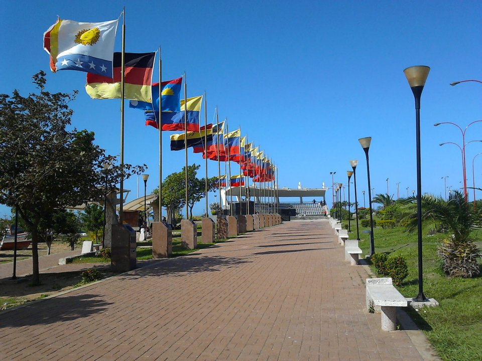 Monumento a la Bandera en La Vela de Coro.